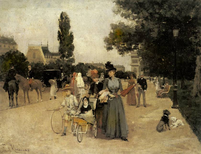 Les Champs-Élysées, vue sur l'arc de Triomphe, huile sur toile par Francesco Miralles Galup (1848-1901).